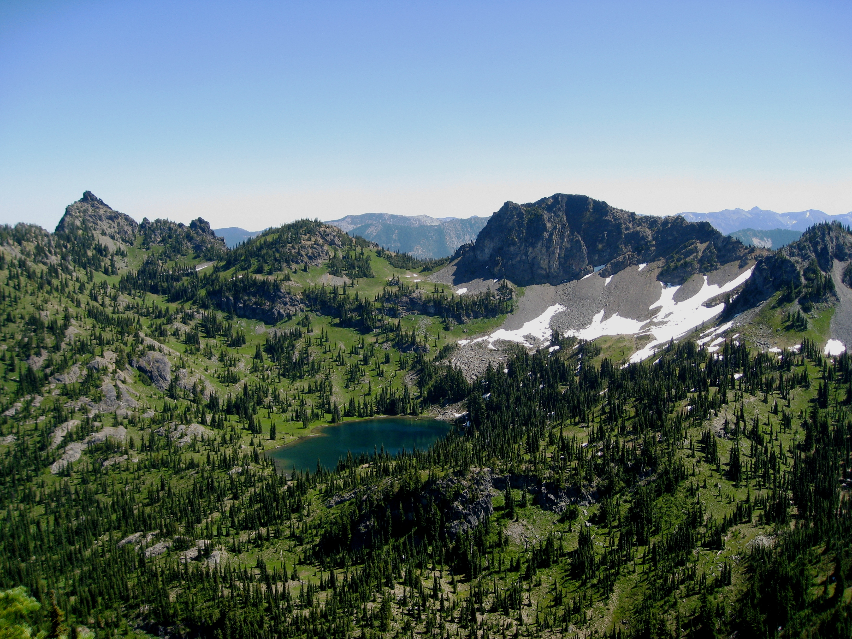 vc 169